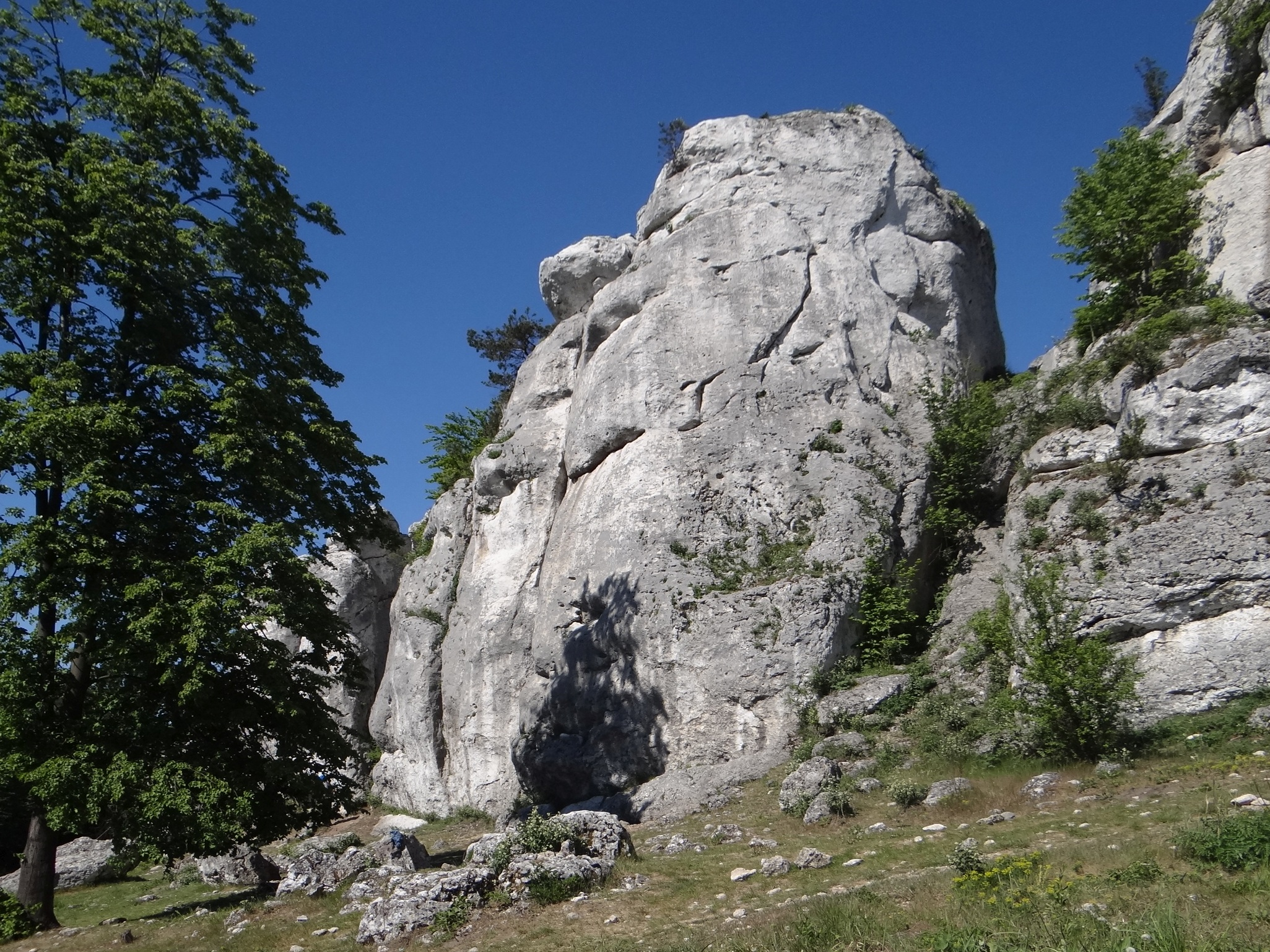 Formy skałkowe na Górze Zborów